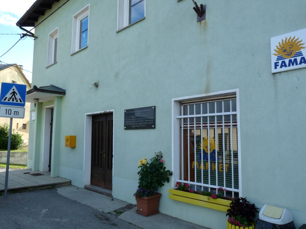 Dragotin Kette, Zagorje